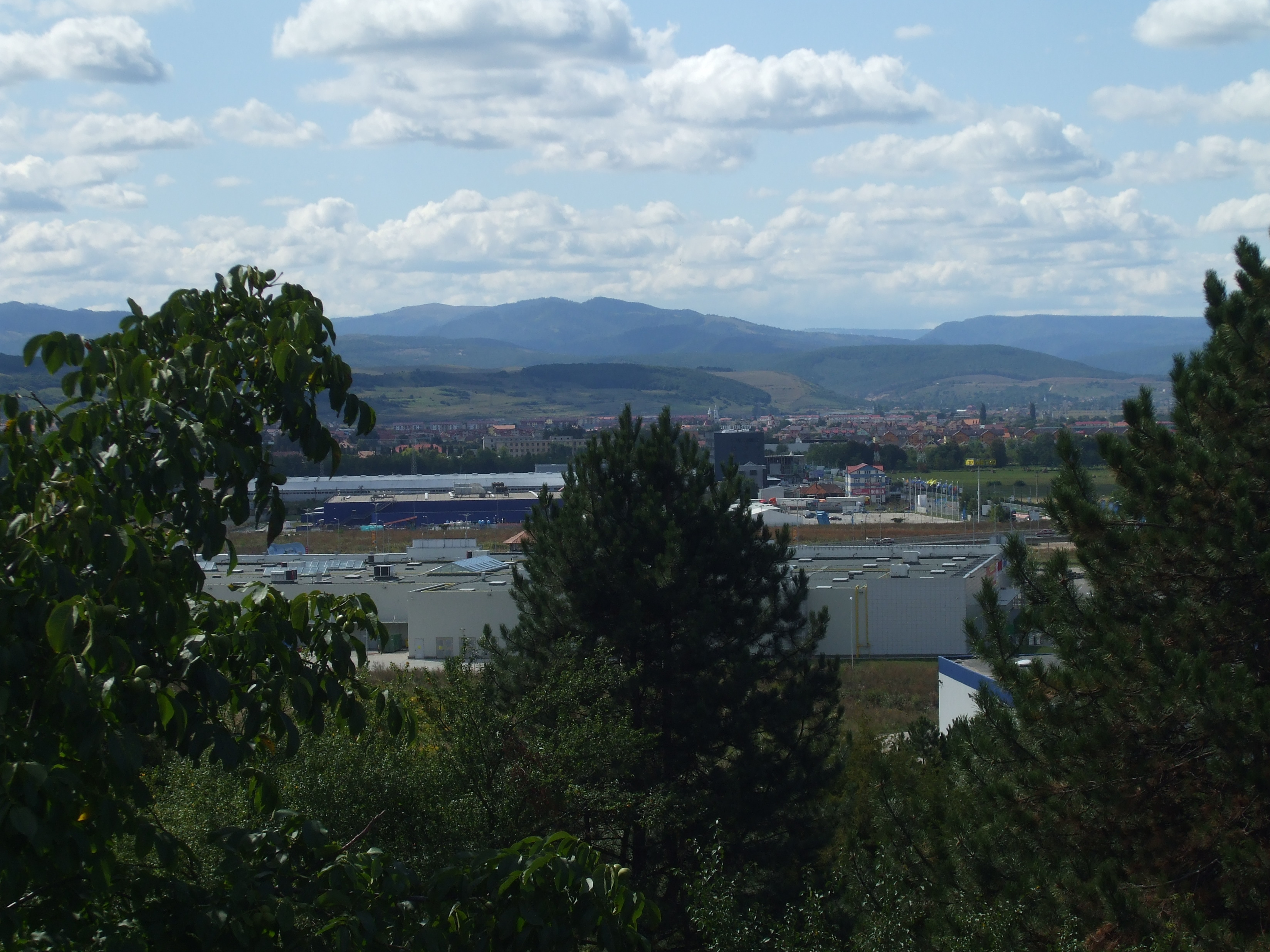 Floresti , Cluj - Panoramă de pe Dealul Colina din Cluj - Napoca . În plan apropiat se văd marile complexe comerciale Polus si Metro .